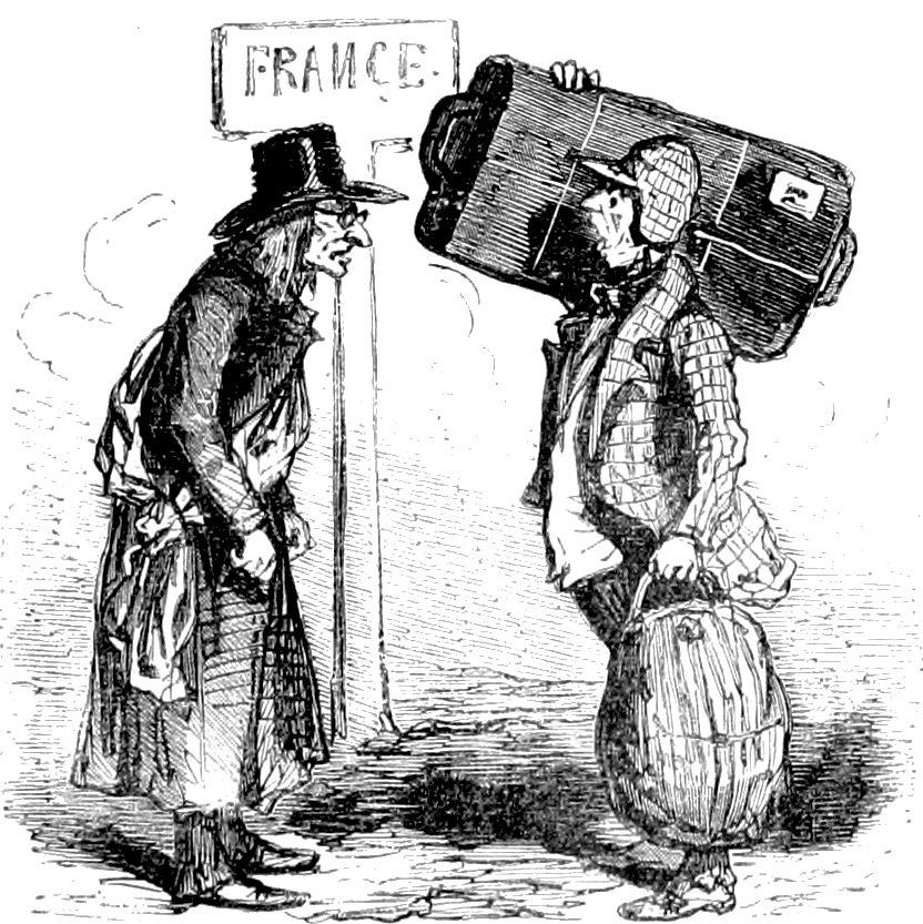 M. CABET PRÉSIDENT DE LA RÉPUBLIQUE. LE VOYAGEUR. — Comment ! la France ça n’est plus ici ? M. CABET. — Non, monsieur, la France, est maintenant en Amérique ; j’ai envoyé tout le inonde en Icarie, il ne reste plus personne ici…